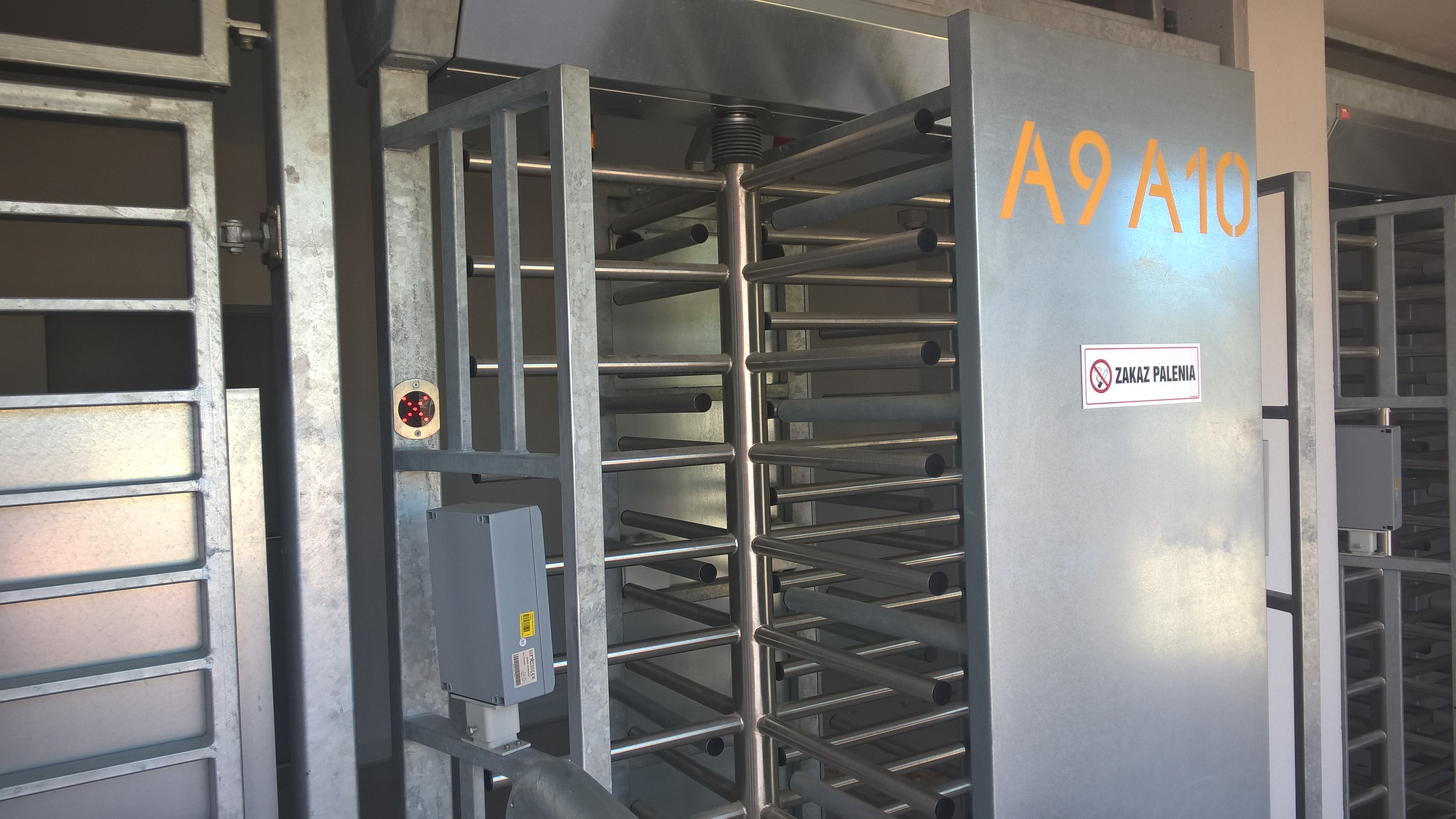 Stadion Widzewa – wejście z kołowrotami na sektory A9 i A10